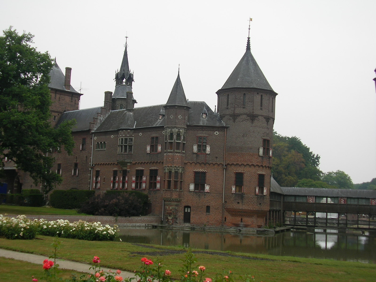 Kasteel De Haar 22 juli 2006 Gemaakt door wikipedia vrijwilliger gijsevers